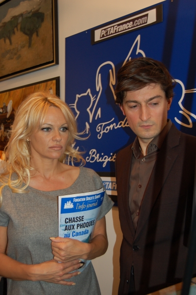 Œuvre de Christophe Marie - publiée par Arnaud 25 : Pamela Anderson et Christophe Marie (porte-parole de la Fondation Brigitte Bardot) à la Fondation Brigitte Bardot en 2008 pour dénoncer la chasse aux phoques